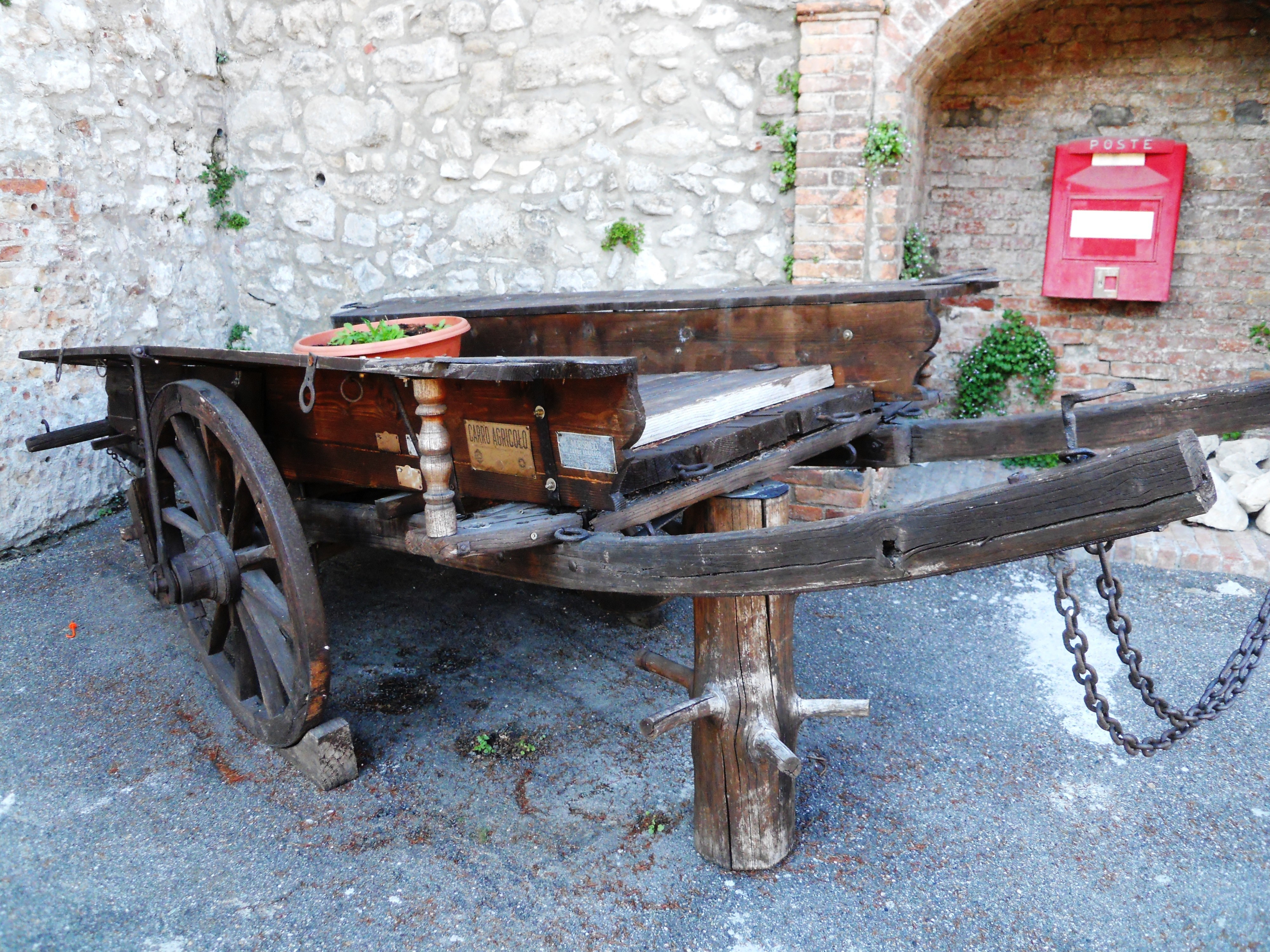 Carro agricolo nel Monferrato